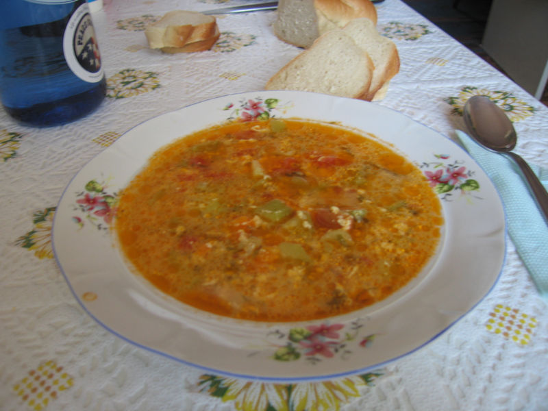 taken by: ionntag צ'ורבה